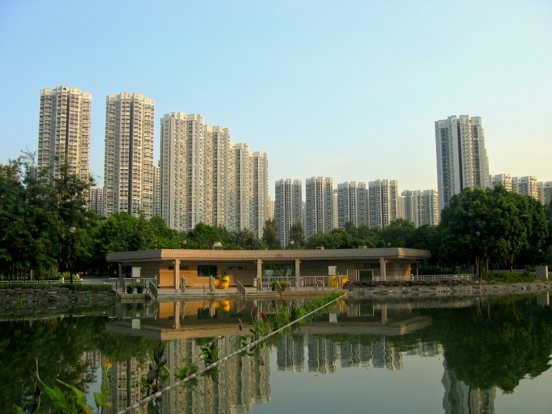 Kingswood Villa